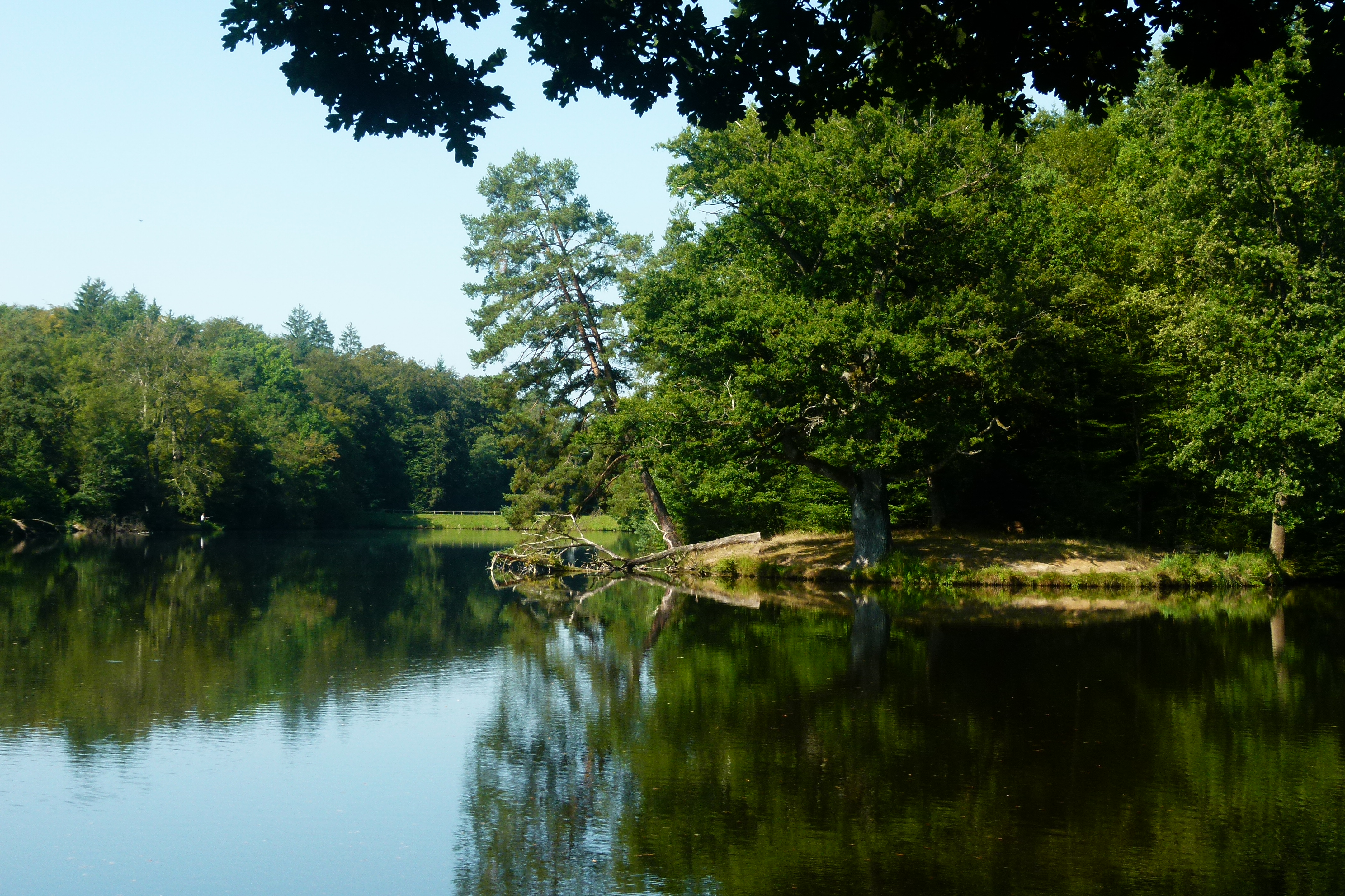 Plätzchen am Pfaffensee, wo die Glems einmündet, Naturschutzgebiet „Rotwildpark bei Stuttgart“